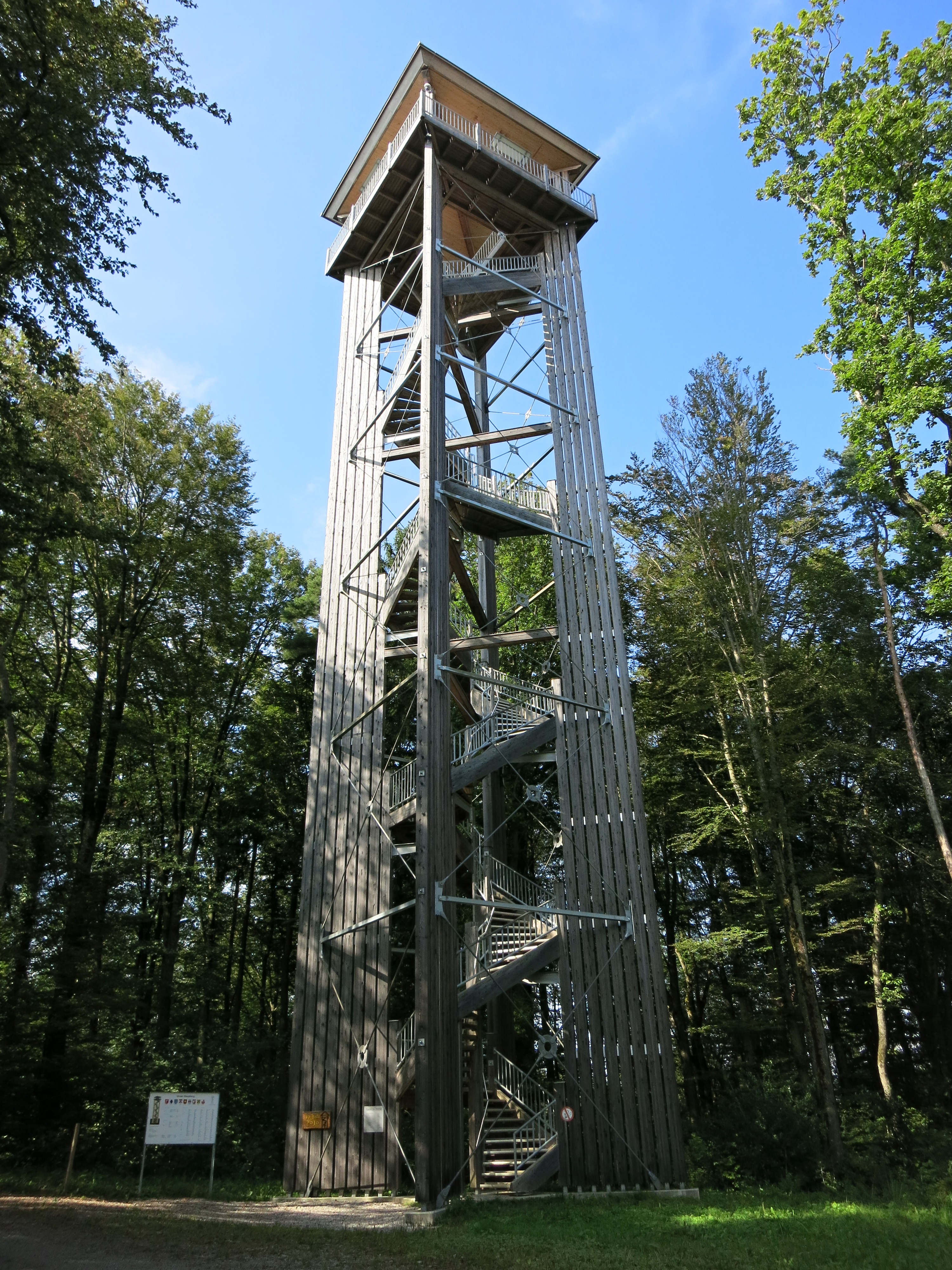 Aussichtsturm Altberg, Dänikon